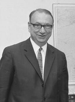 Bundespräsident Lübke empfängt den Reg. Bürgermeister von Berlin, Albertz